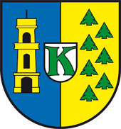 Amtliches Wappen der Gemeinde Kottmar